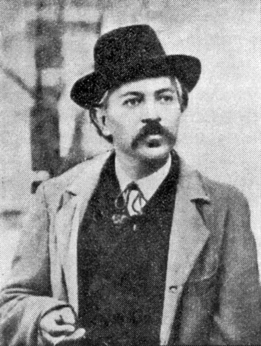 Володимир Самійленко